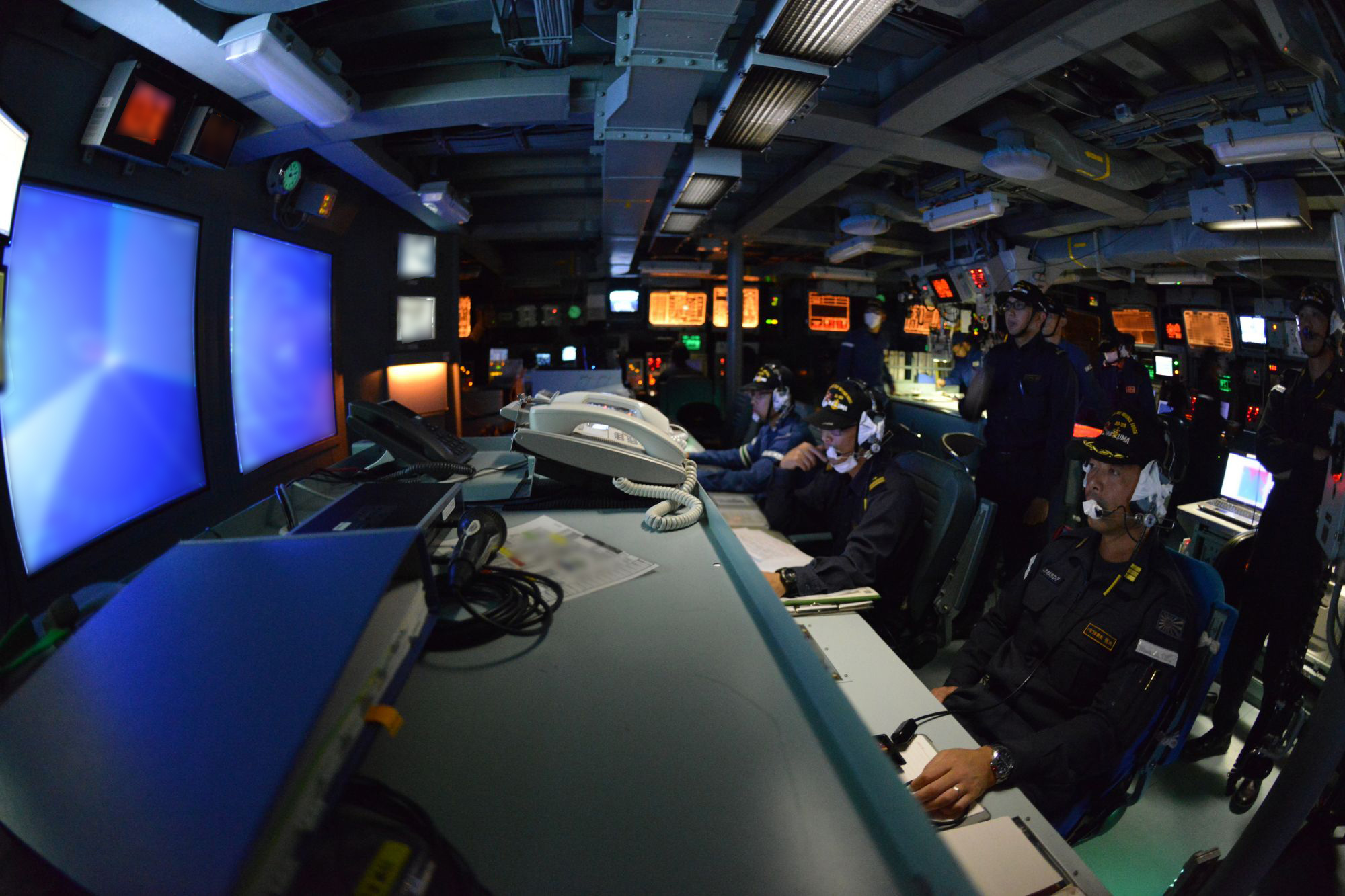 （9月27日）ISEAD2018は、インド洋において、対空射撃訓練や立入検査訓練を行いました。本訓練を通じて、部隊としての戦術技量の向上を図ります。